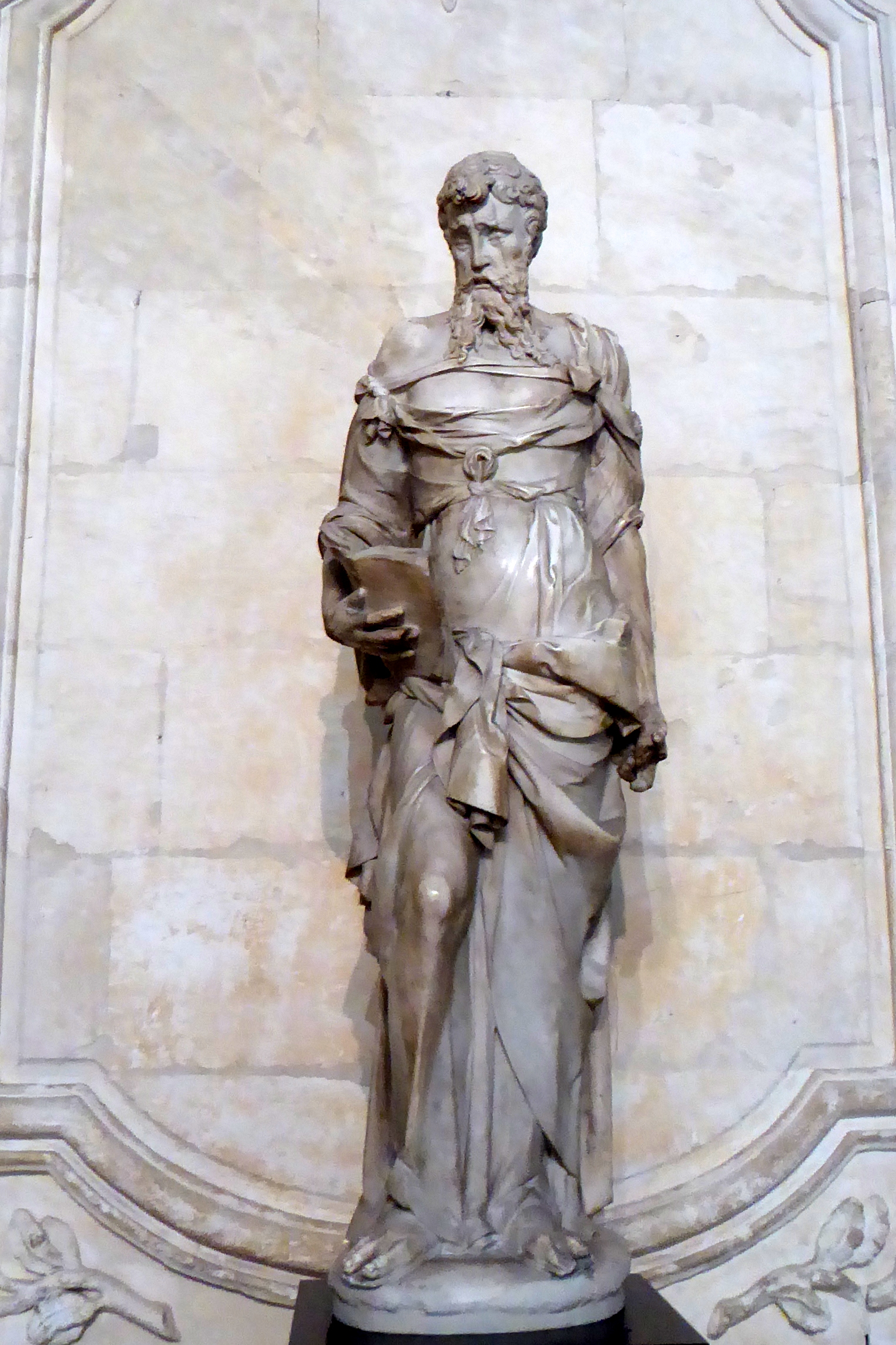 Saint-Paul captif - François Marchand, 1543 - Albâtre provenant du maître-autel de l'ancienne église abbatiale de Saint-Père-en-Vallée à Chartres (actuelle église Saint-Pierre). Musée des beaux-arts de Chartres, Eure-et-Loir (France).